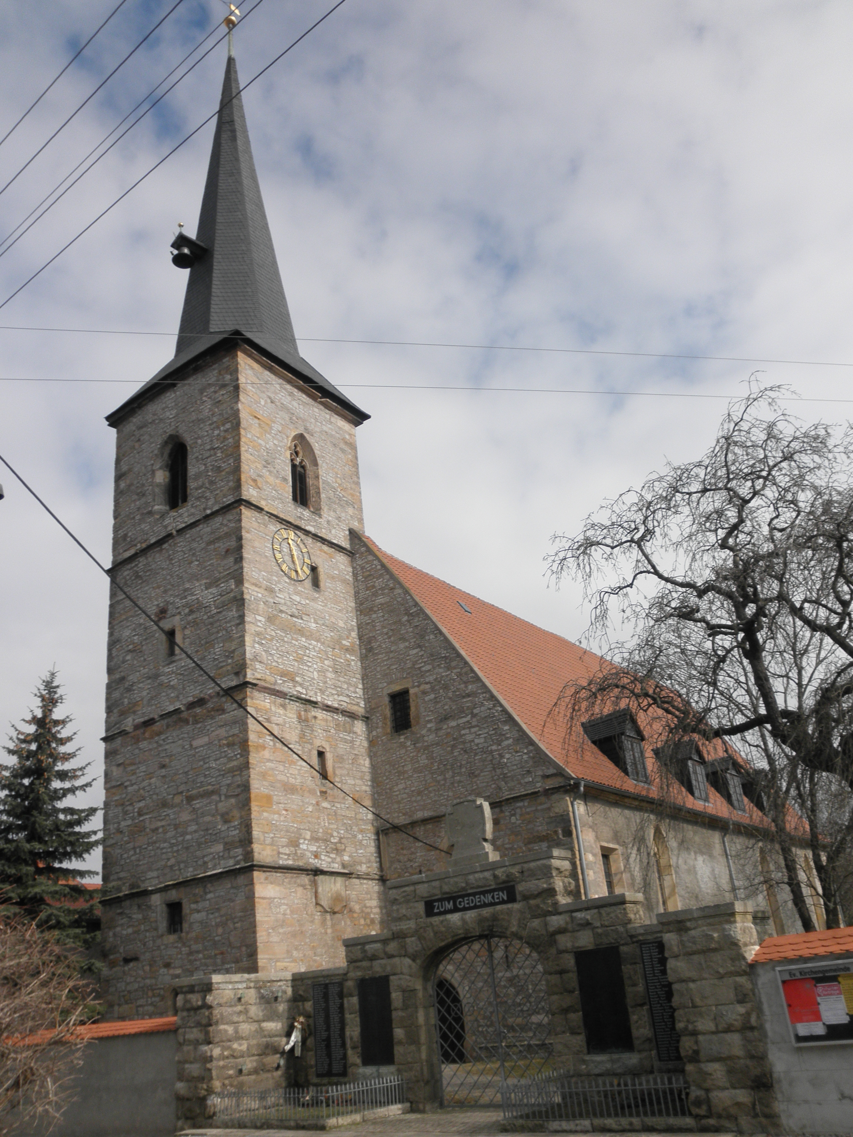 Kirche Elxleben